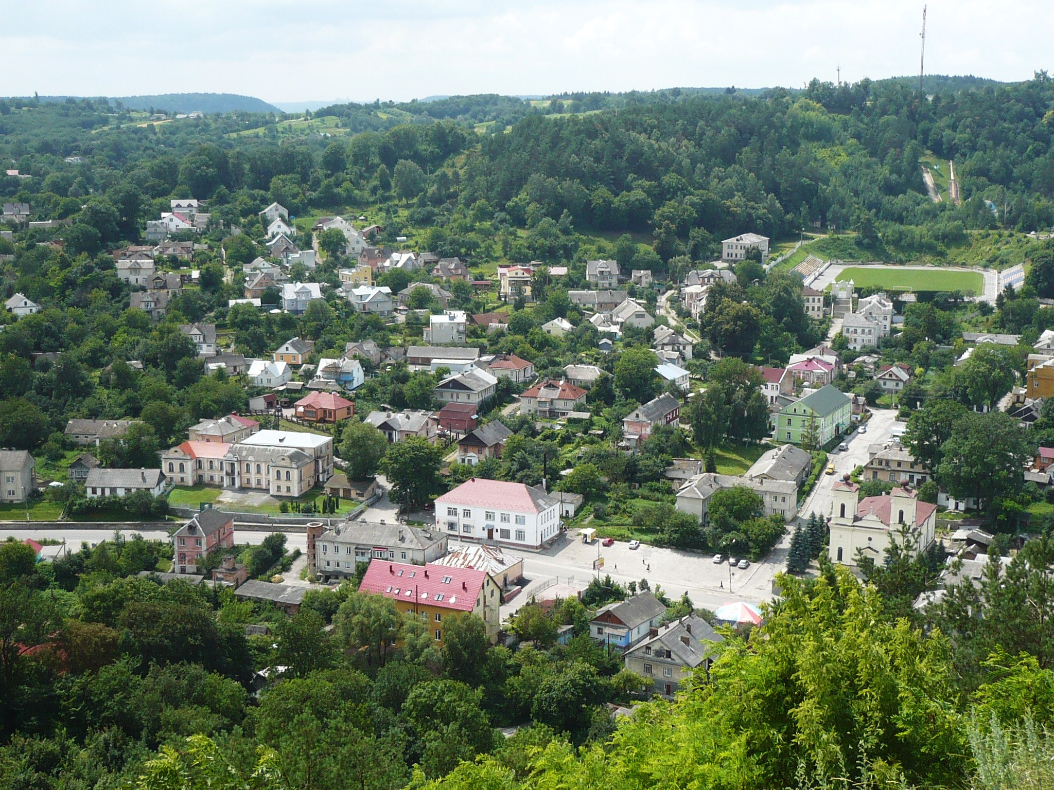 Widok na Krzemieniec